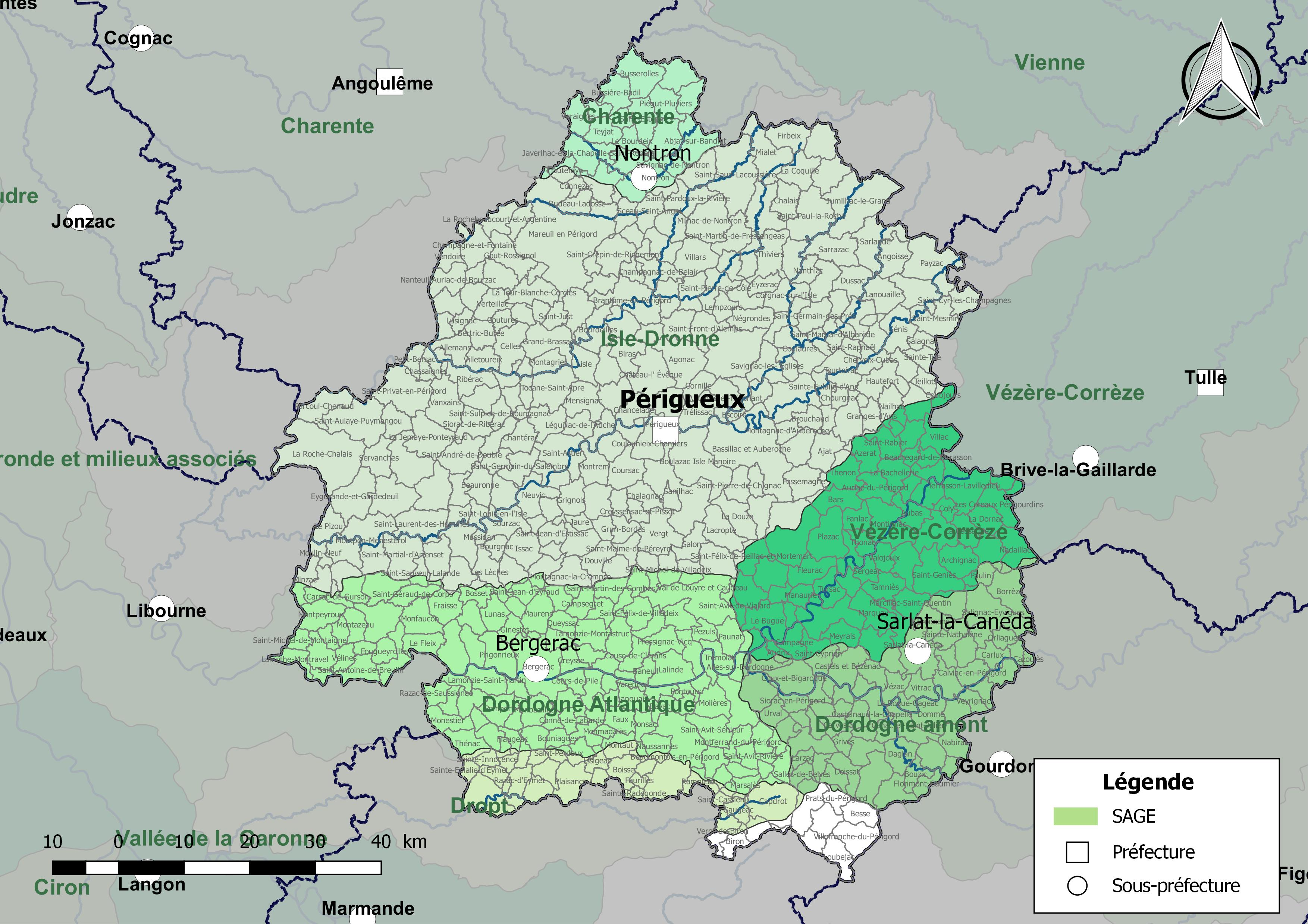 Carte des schémas d'aménagement et de gestion des eaux (SAGE) concernant le département de la Dorodgne (France) au 1er janvier 2018.